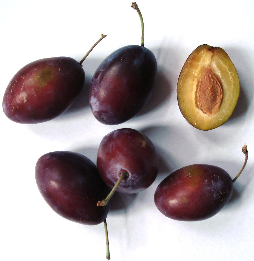 Cacaks Beste